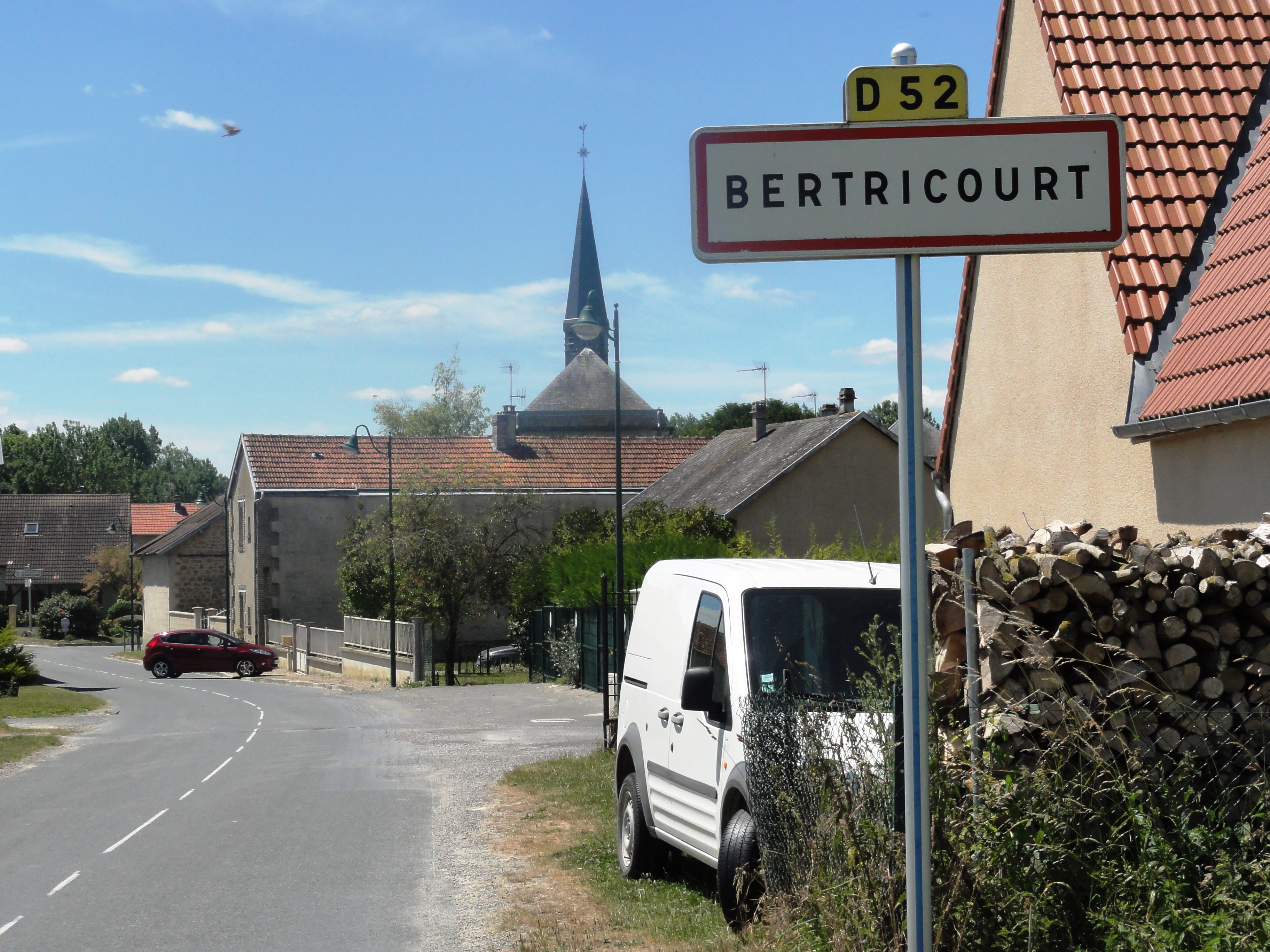 Bertricourt (Aisne) city limit sign